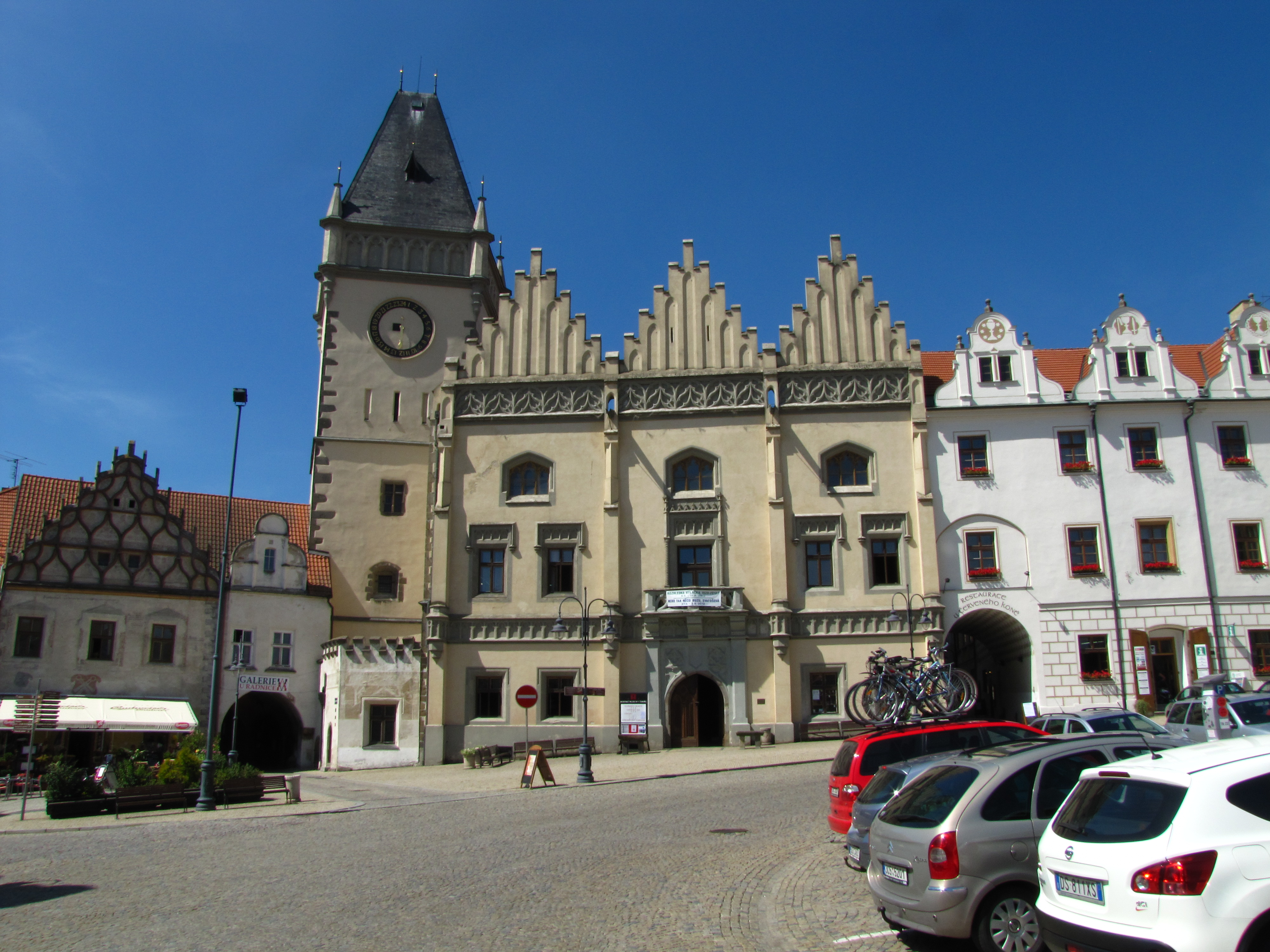 Měšťanský dům (Tábor), nám. Žižkovo 23, Tábor